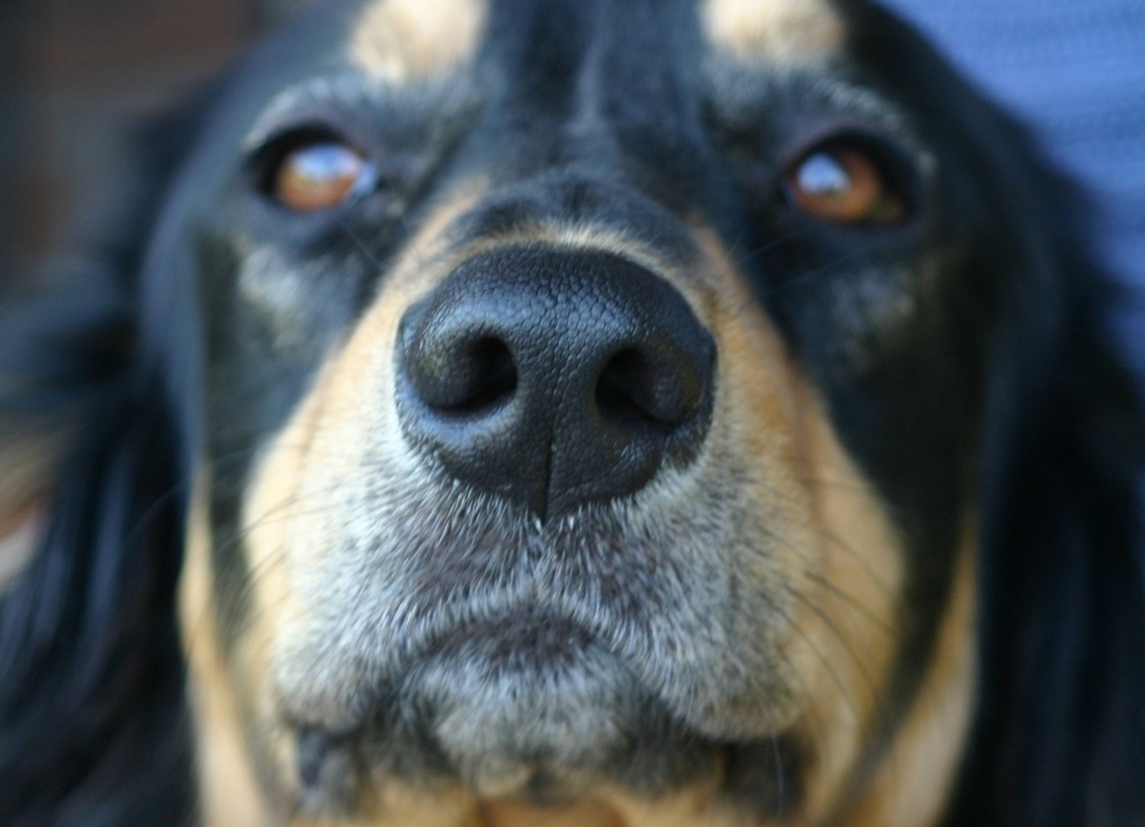 Nuesspigel vun engem Hond. Kategorie:Anatomie vun den Déieren